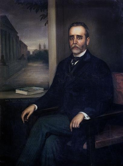 Retrato del político español de orígen cordobés José Sánchez Guerra (1859-1935), que llegó a ser presidente del Consejo de Ministros durante el reinado de Alfonso XIII de España.